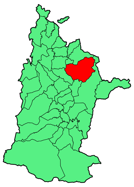 Sohutaren kokapena Zuberoan